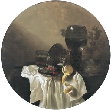 Still life